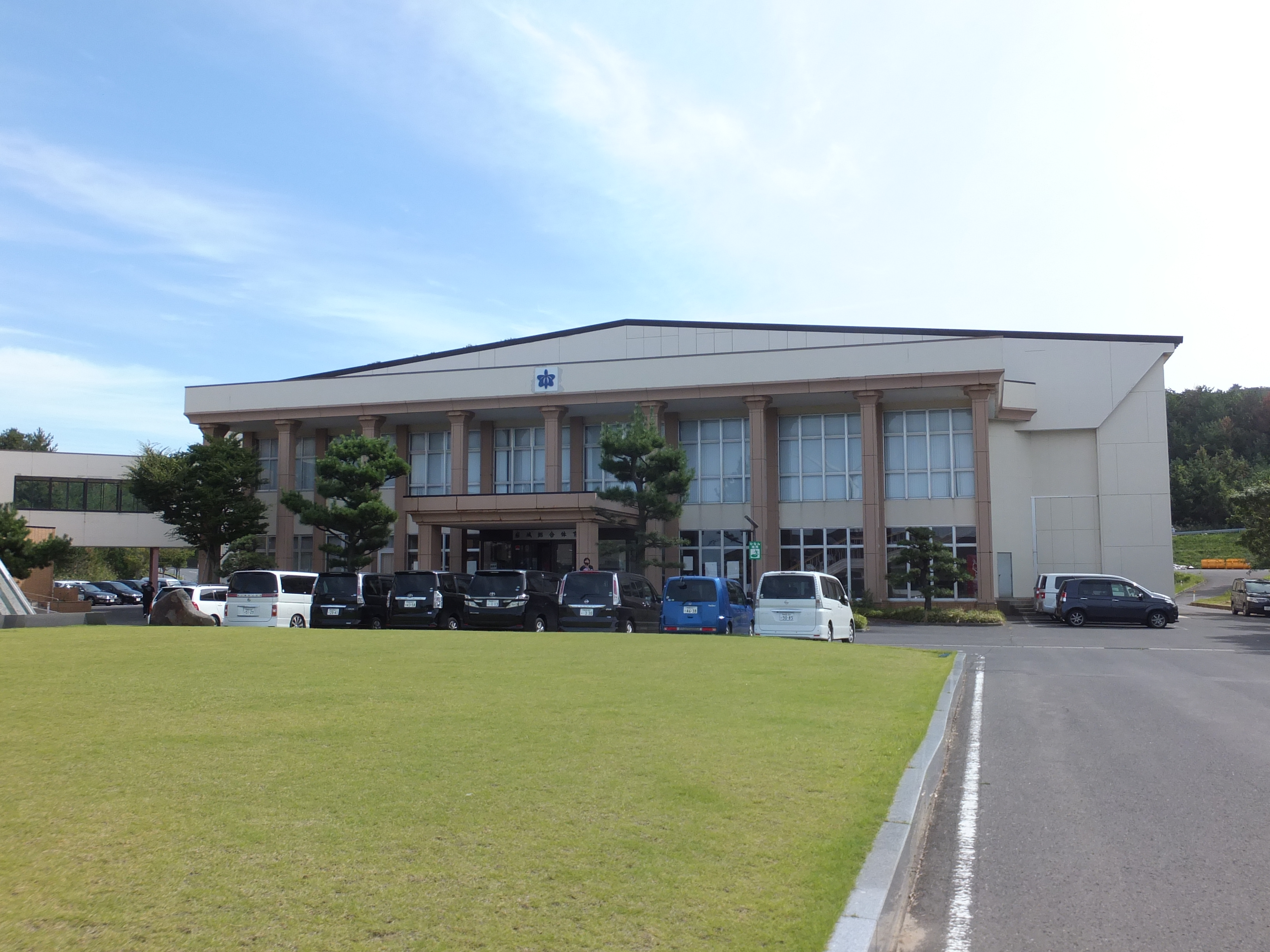 岩城総合体育館